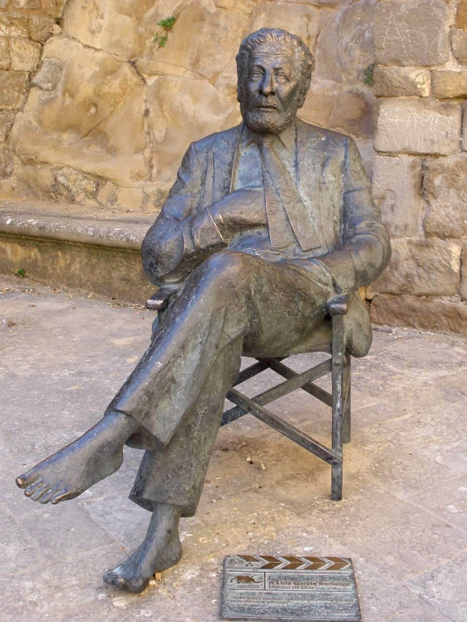 Sos del Rey Católico (Zaragoza)